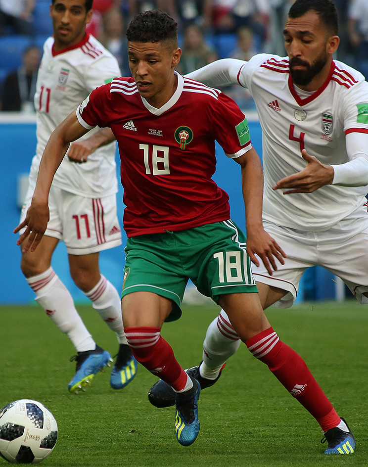 Автогол сборной Марокко принес победу Ирану